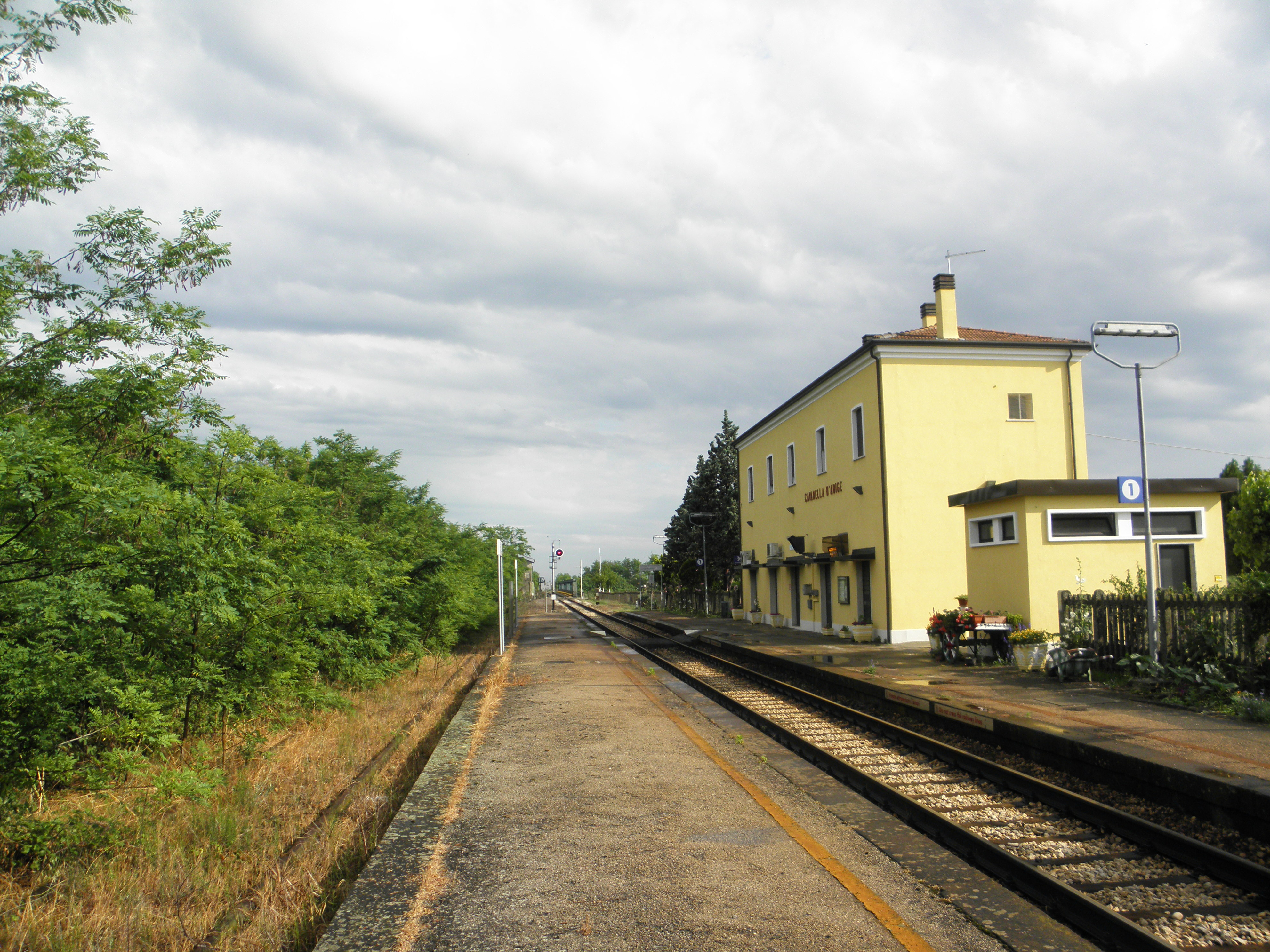 Cavanella d’Adige, frazione di Chioggia: il fabbricato viaggiatori dell’omonima stazione ferroviaria, lato piazzale del ferro, verso sud (ponte sul fiume Adige).